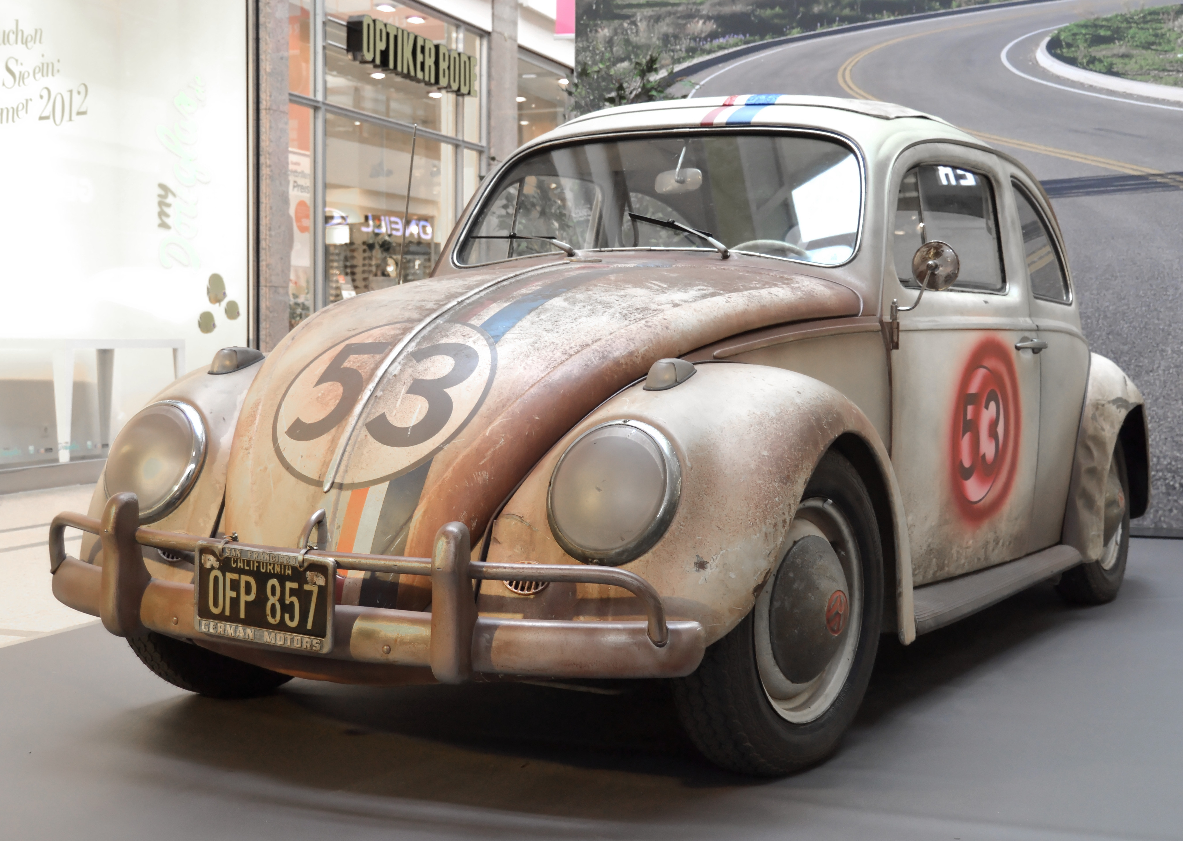 Original 1963er Herbie mit der grauen Innenausstattung, 1192 ccm, 34 PS, 115 km/h, 780 kg